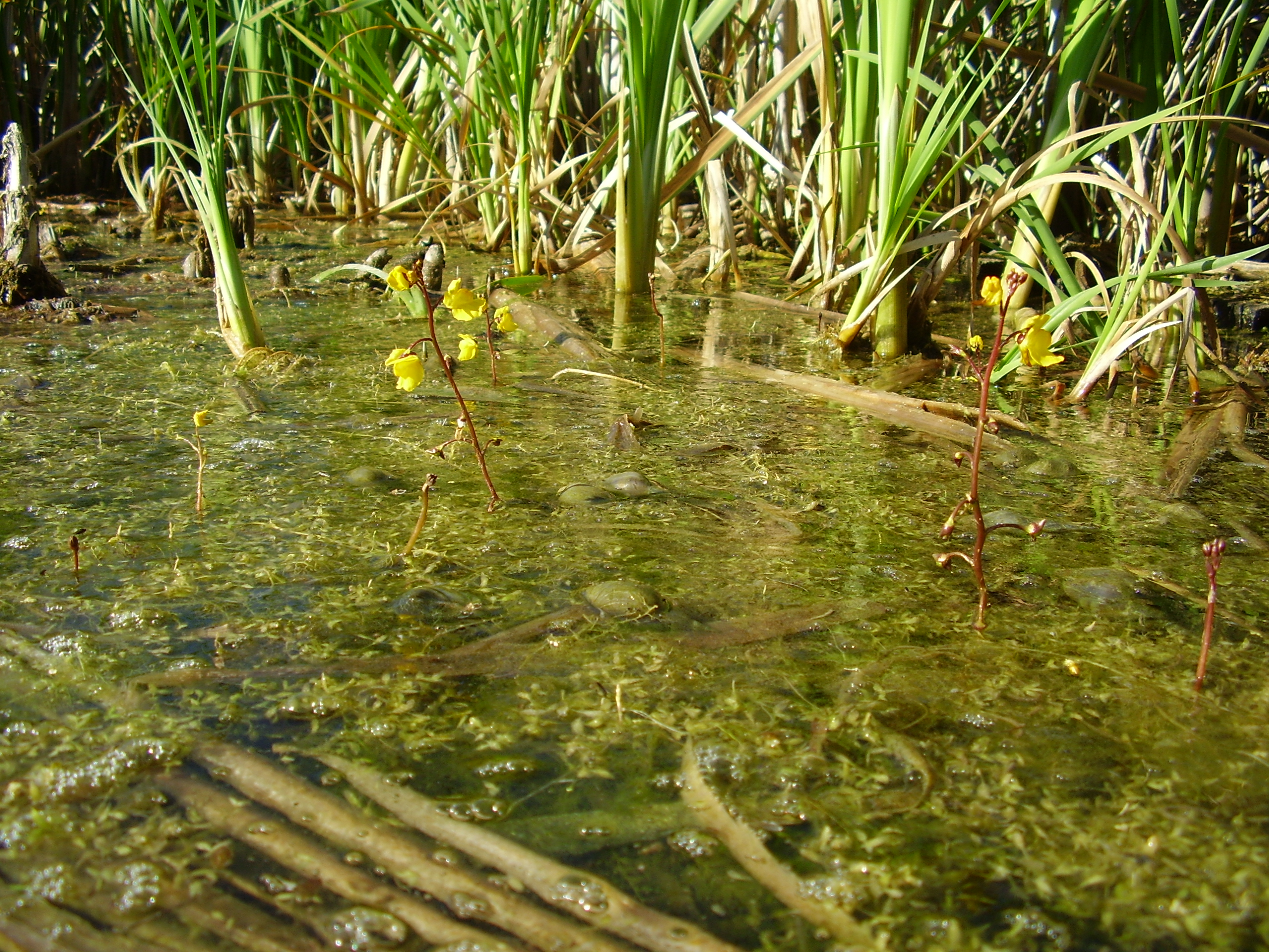 Обикновена мехурка - цветове, в Драгоманското блато